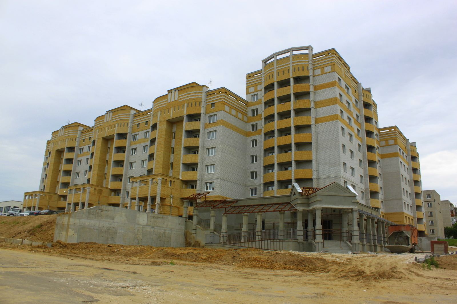 Вяткино